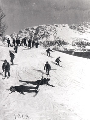 Skiers in Cortina d'Ampezzo (Italiy)